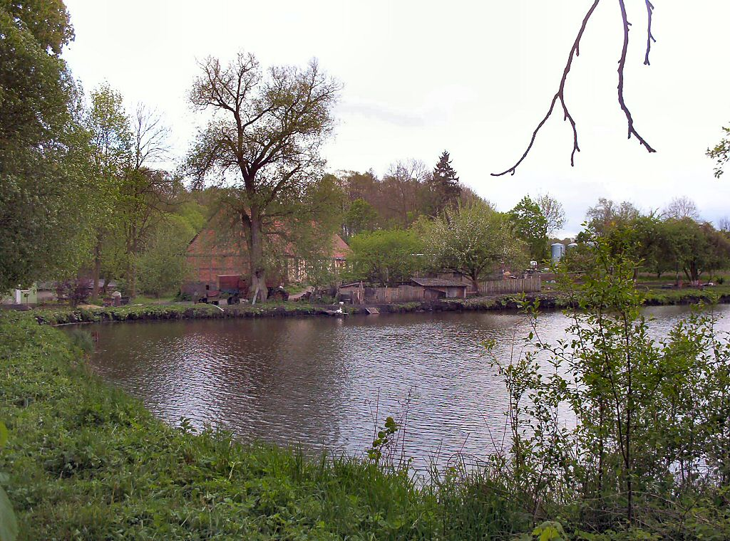 Niepołcko (gmina Barlinek) - pejzaż wsi